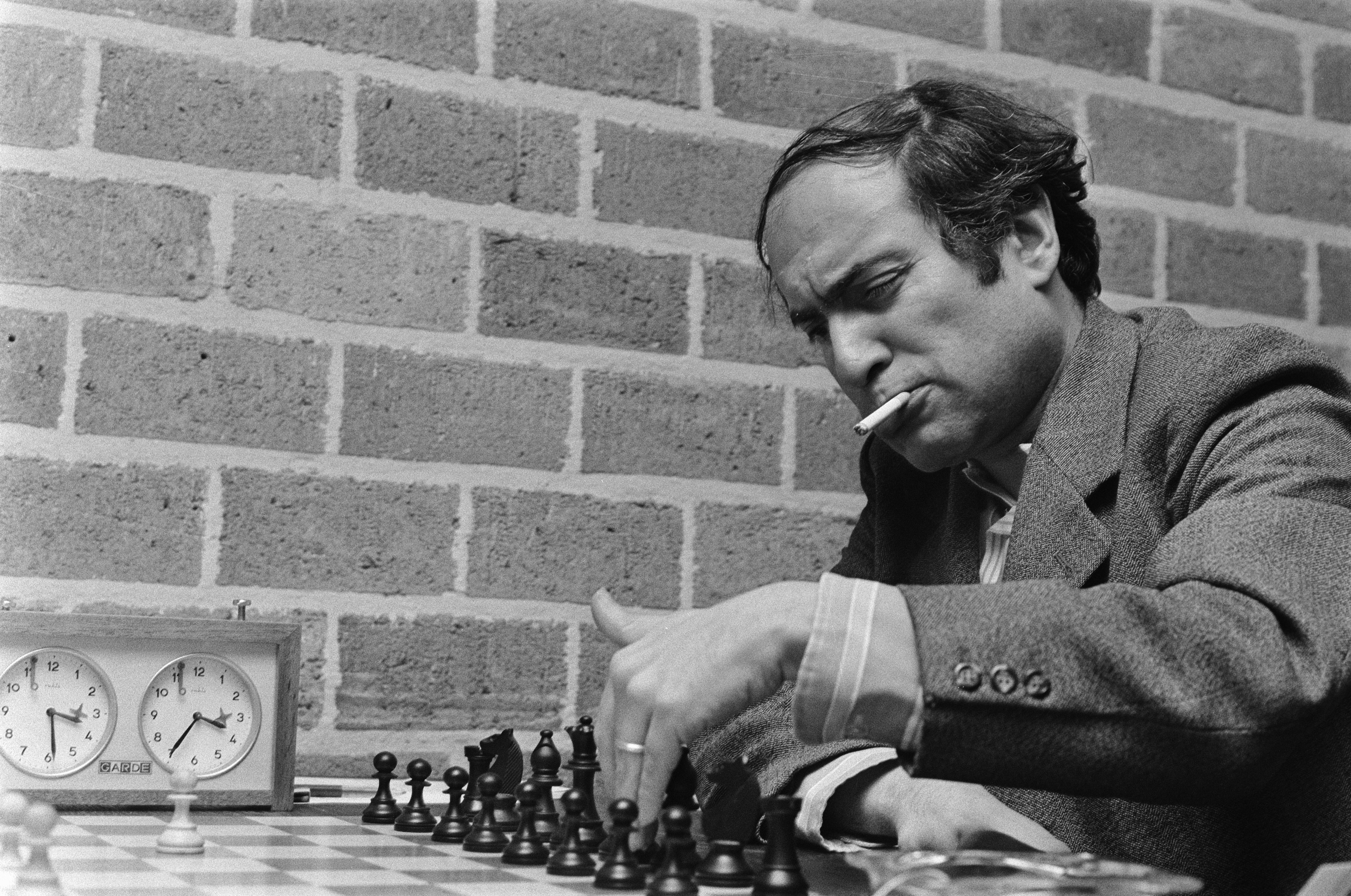 Collectie / Archief : Fotocollectie Anefo Reportage / Serie : [ onbekend ] Beschrijving : Hoogovenschaaktoernooi 1976; Talj in aktie, kop Datum : 17 januari 1976 Trefwoorden : schaken Instellingsnaam : Hoogovenschaaktoernooi Fotograaf : Mieremet, Rob / Anefo Auteursrechthebbende : Nationaal Archief Materiaalsoort : Negatief (zwart/wit) Nummer archiefinventaris : bekijk toegang 2.24.01.05 Bestanddeelnummer : 928-3647